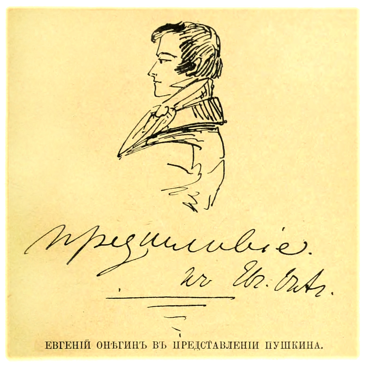 Портрет мужчины (рисунок Пушкина). В 1909 г. С. А. Венгеров предположил, что это изображение Евгения Онегина: "Едва ли можно сомневаться в том, что этот найденный нами в тетради Румянцевского музея №2387, л.62, портрет, — и по одежде, и по тому, что под ним подписано "Предисловие к Евгению Онегину", и по общему духовному изяществу типа — есть именно Онегин. Онегин последней главы, с отпечатком глубокого страдания на благородном лице..." Современная атрибуция, принадлежащая Т. Г. Цявловской ("Рисунки Пушкина") - портрет Д. В. Веневитинова